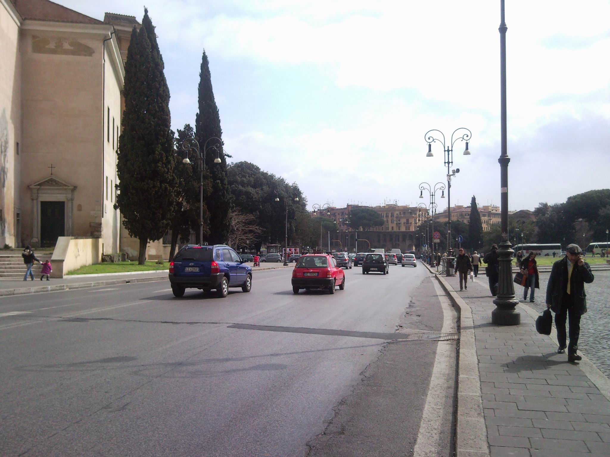 Quartiere IX Appio Latino, Roma, Italy